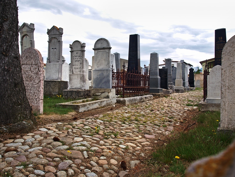 Kežmarok - Židovský cintorín